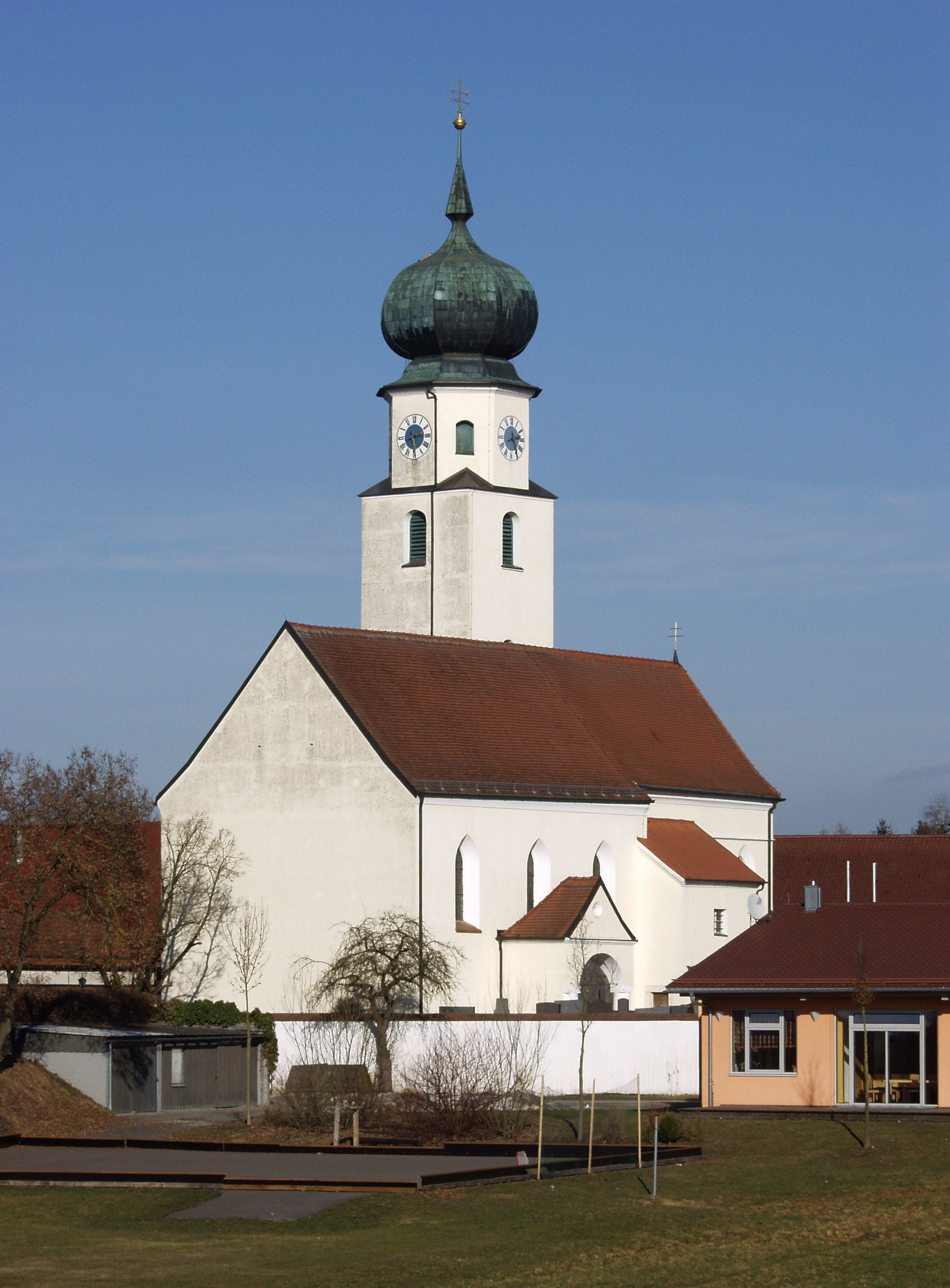 Die Kirche St. Gangolf in Kößnach, Gmd. Kirchroth, Lkr. Straubing-Bogen Beschreibung des Bayerischen Landesamtes für Denkmalpflege: Kath. Filialkirche St. Gangolf, 2. Hälfte 15. Jh., Langhaus im 16. Jh. verändert; mit Ausstattung; gleichzeitig Anbau der Vorhalle.